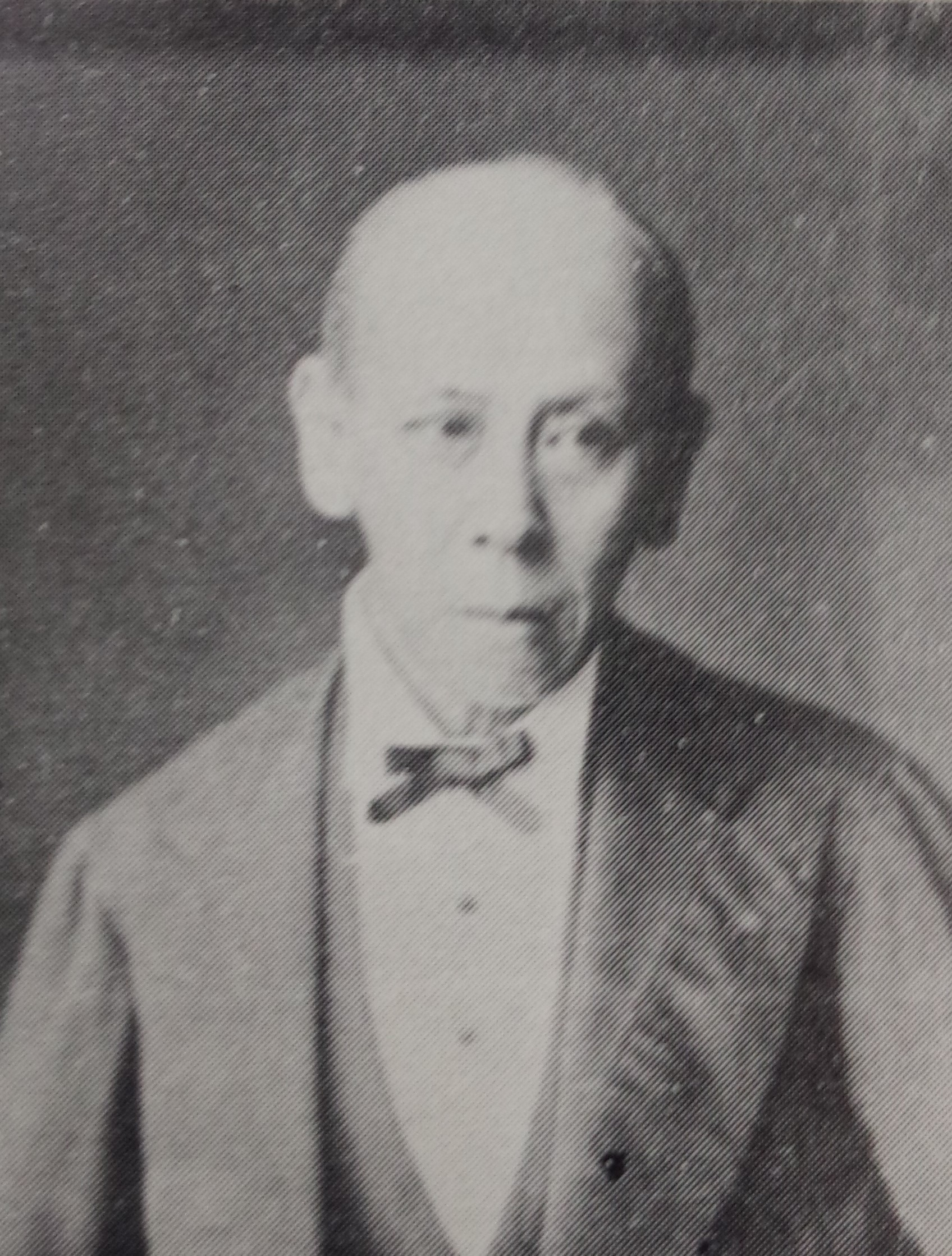 竹腰正富の肖像写真。